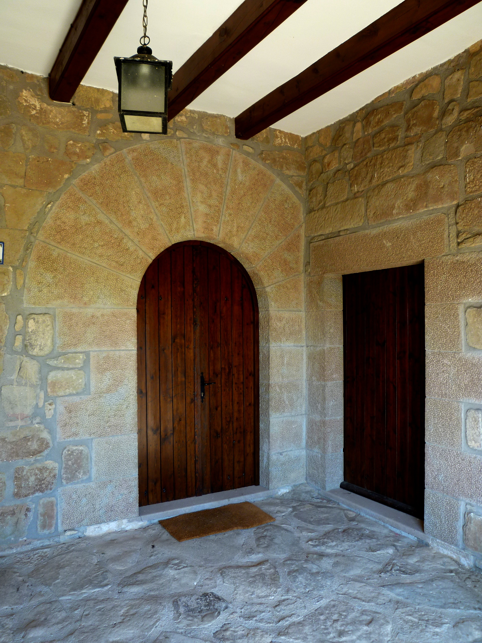 Mas de la Casanova de Puig-redon (Torà): portal interior